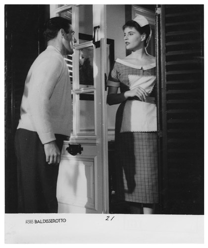 Cristina Berys, caracterizada como una mucama, en el umbral de una puerta con postigones, recibiendo a Carlos Estrada. Película "Los maridos de mamá". La foto contiene un borde inferior blanco con la inscripción del estudio fotográfico. . Resumen: Papel fotográfico brillante. Resumen: Borde inferior blanco. Resumen: Imagen vertical. Resumen: Interior. Resumen: Plano largo.